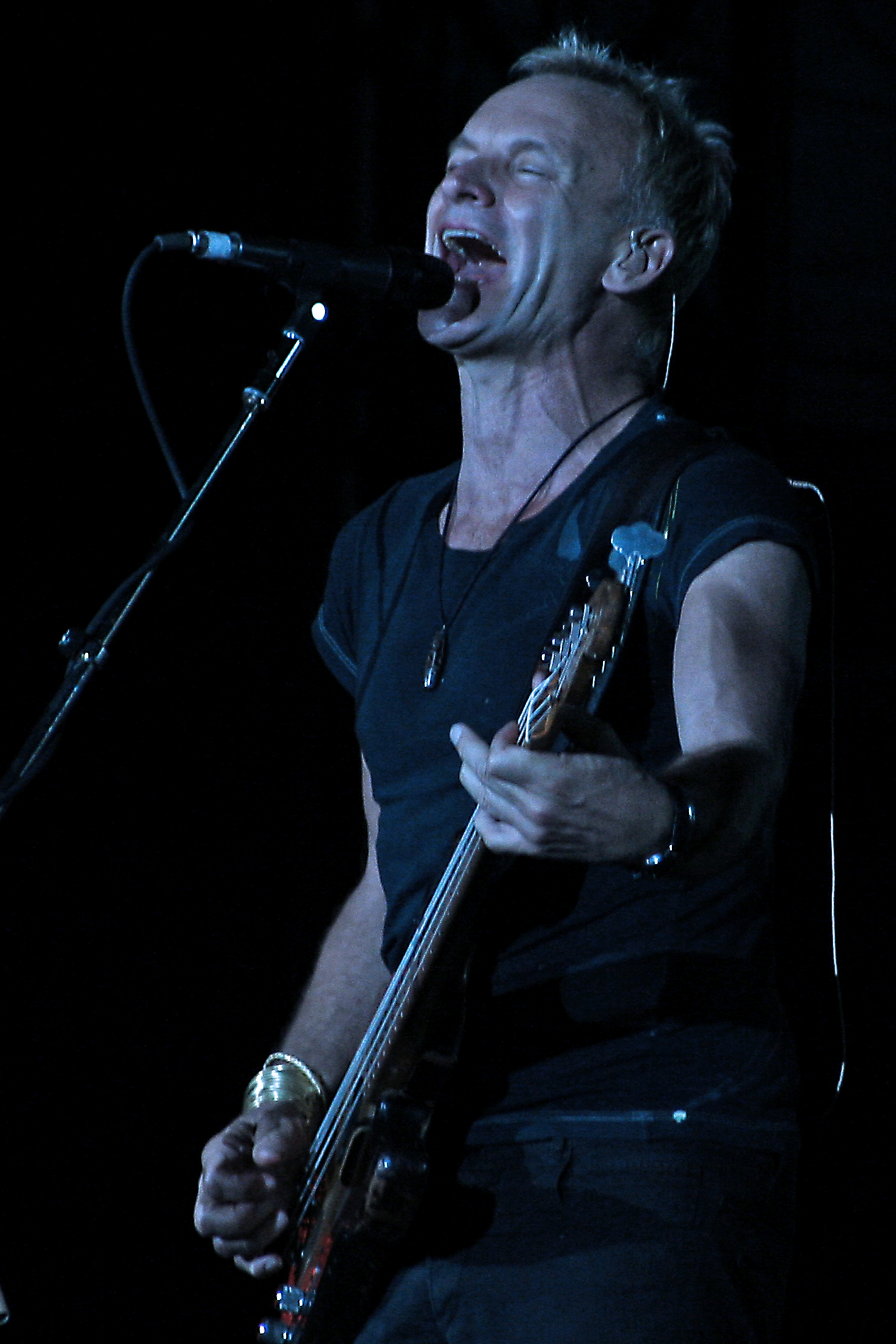 Sting